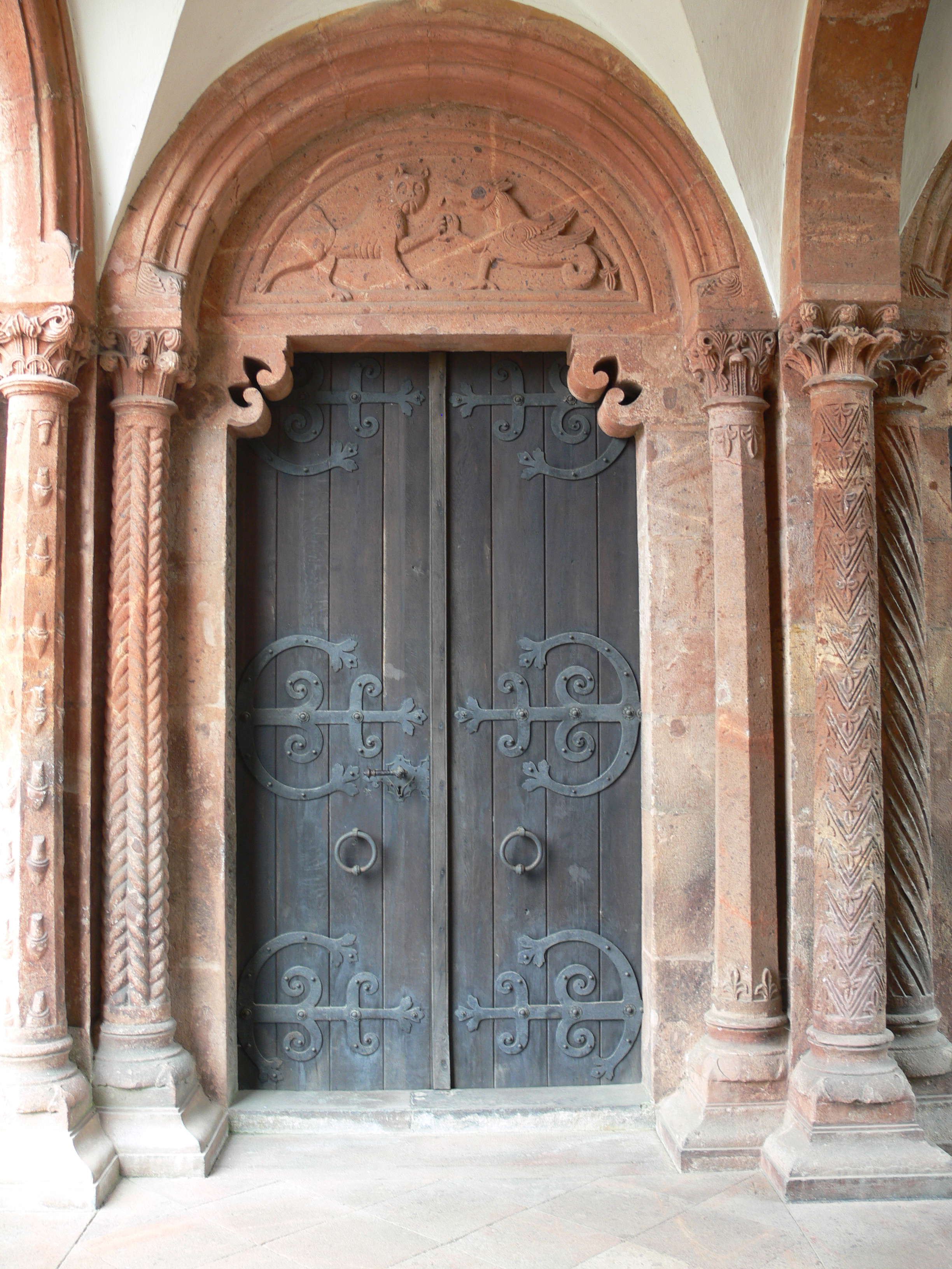 Wechselburg, Landkreis MittelsachsenVorhalle der romanischen Basilika